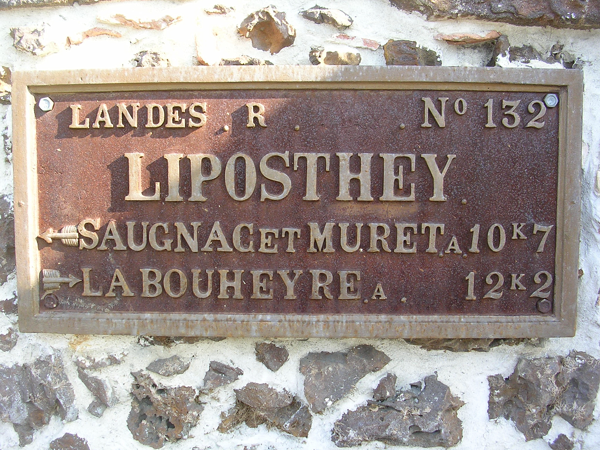 Plaque routière à Liposthey, dans le département français des Landes